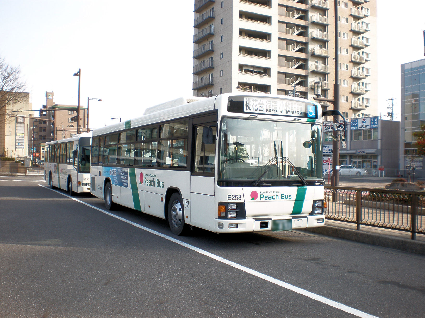 愛知県小牧市で運行されているピーチバスの車両（撮影場所：小牧駅バスターミナル）